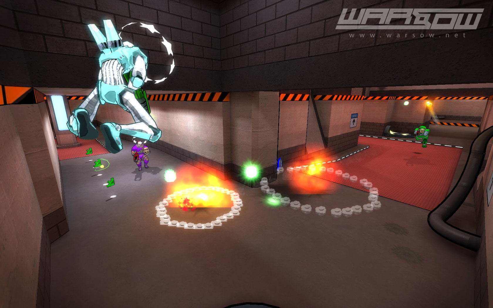 Взято с , по лицензии указанной внизу страницы